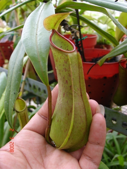 N. albomarginata x reinwardtiana